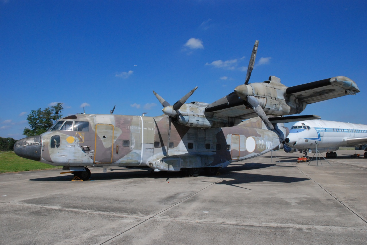 Breguet 941S preserved at Musée de l'Air et de l'Espace